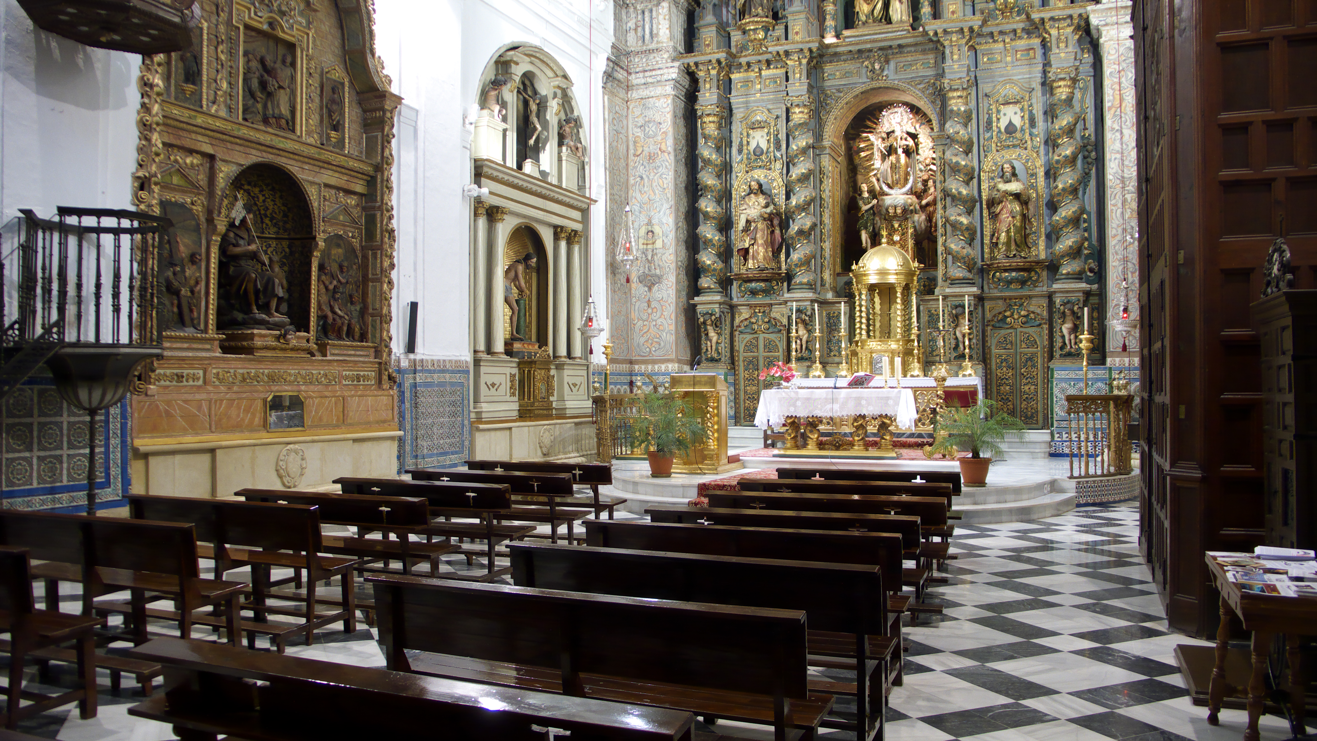 Iglesia del Convento de Santa Ana (Sevilla) Carmelitas Calzadas.